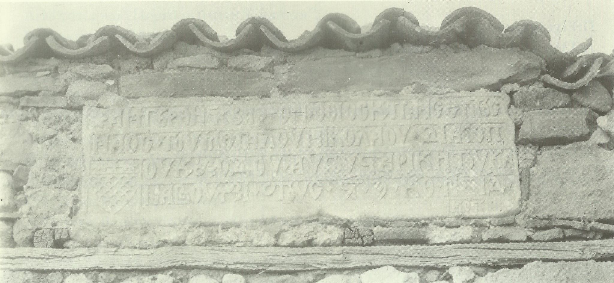 Κτητορική επιγραφή του ναού του Αγίου Νικολάου (κατοπινού Αγίου Βλασίου), στον οποίο η Δόμνα παντρεύτηκε το Χατζη-Αντώνη Βισβίζη, στην Αίνο της Θράκης .Κάπου μεταξύ του 1830-40 η εκκλησία ανακαινίστηκε και μετατράπηκε σε Άγιο Βλάσιο. Από την πρώτη εκκλησία όμως κράτησαν την κτητορική επίγραφή. Τώρα δεν υπάρχει τίποτε, κατεδαφίστηκε από τους Τούρκους.Η φωτογραφία τραβήχτηκε το 1901 .